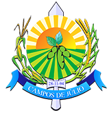 Brasão do Município de Campos de Júlio - MT